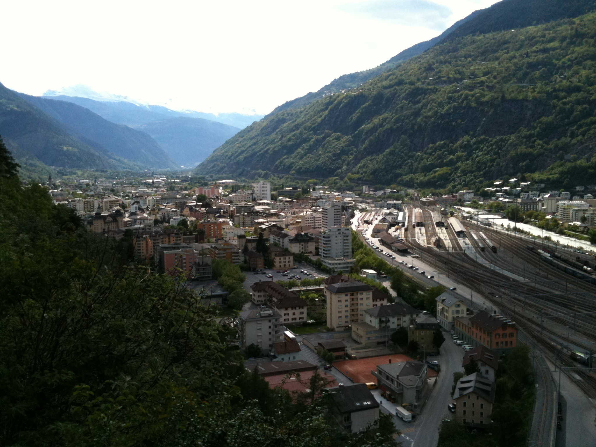 Brig im Oberwallis (von der Biela aus gesehen)